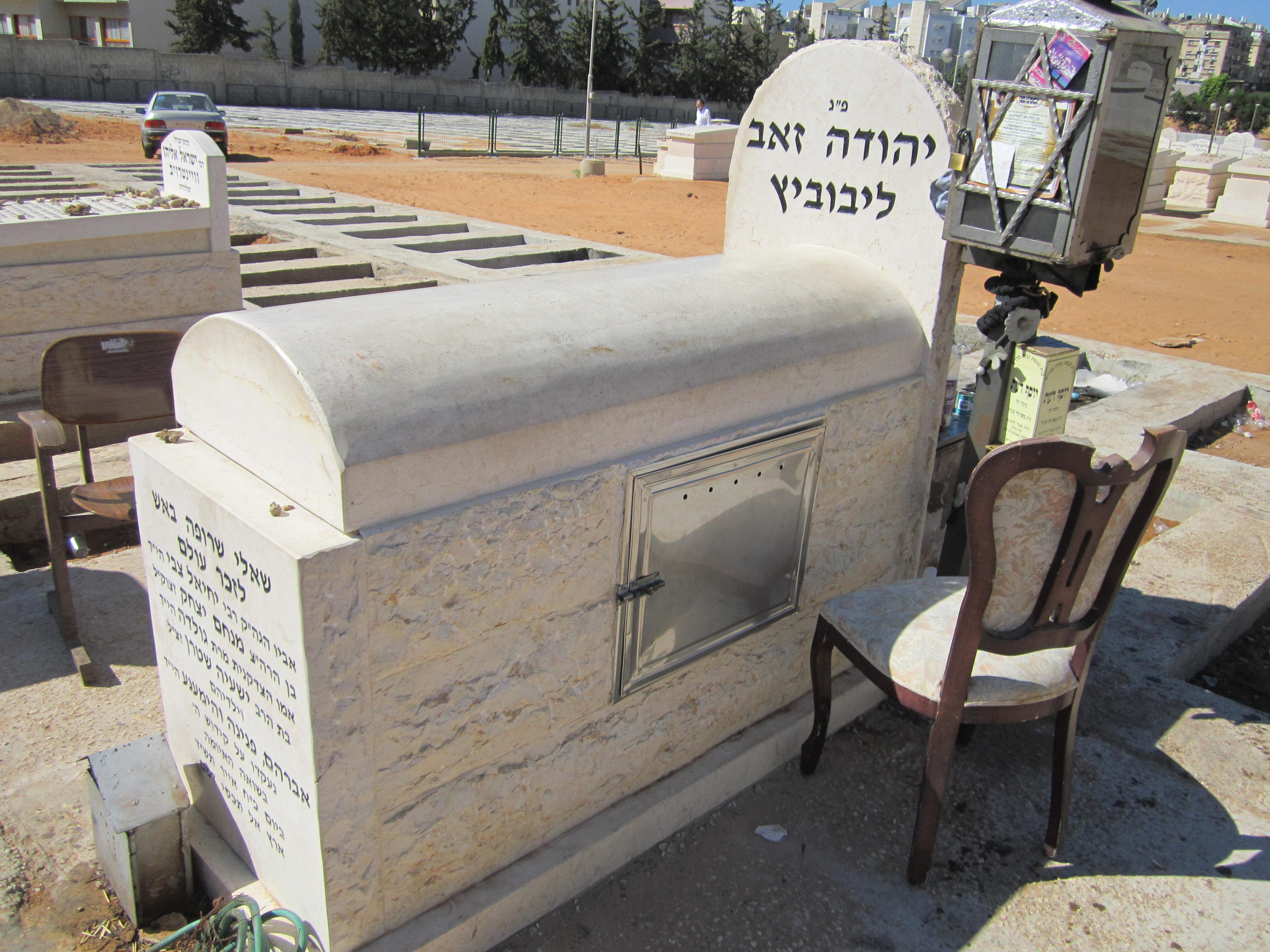 מצבת הרב יהודה זאב ליבוביץ